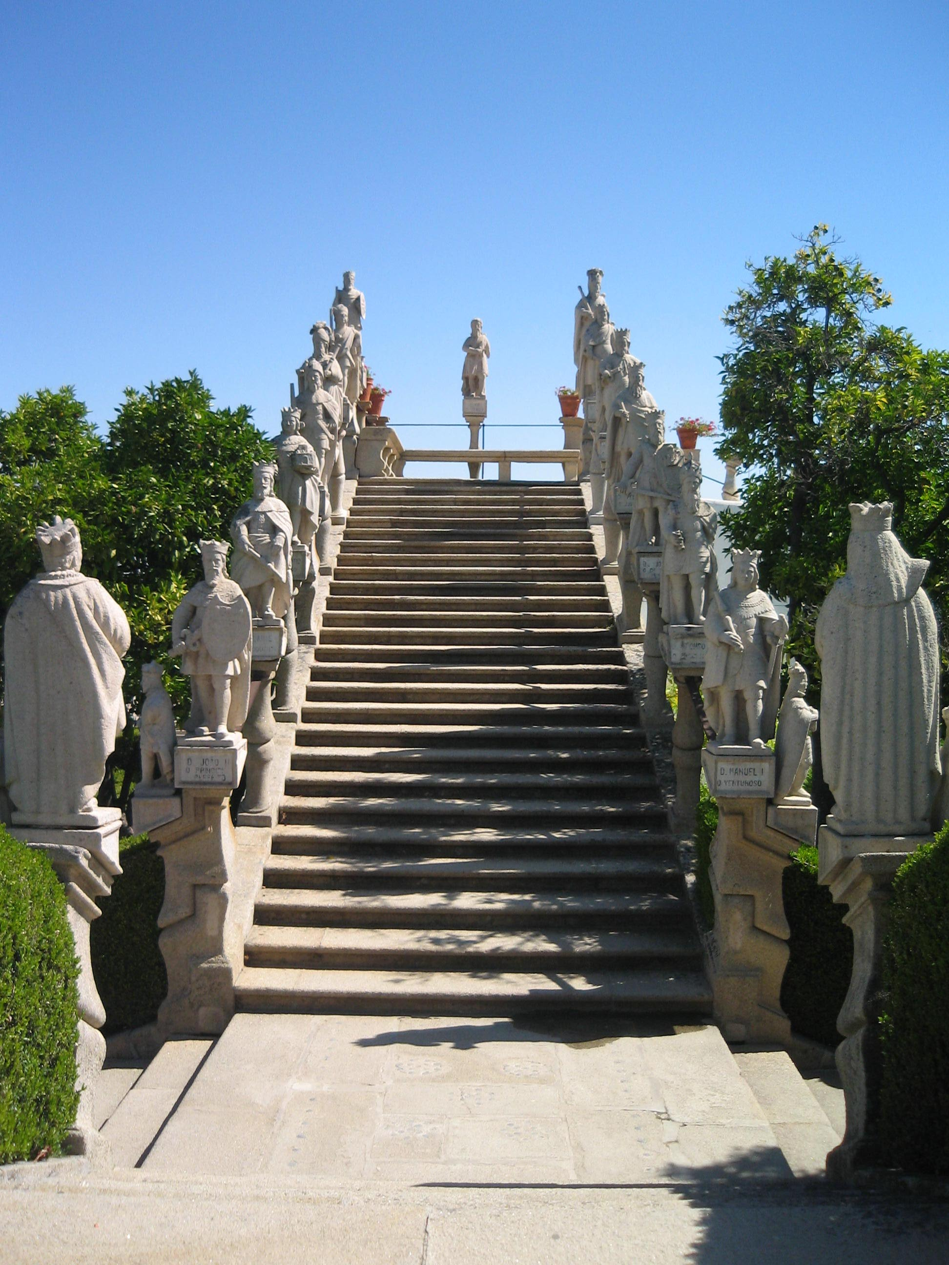 Escadaria com Santos e Apostolos situado no Jardim do Paço em Castelo Branco. This building is classified as Em vias de classificação. This file was uploaded for Wiki Loves Monuments in Portugal with the unique identifier 97010282.